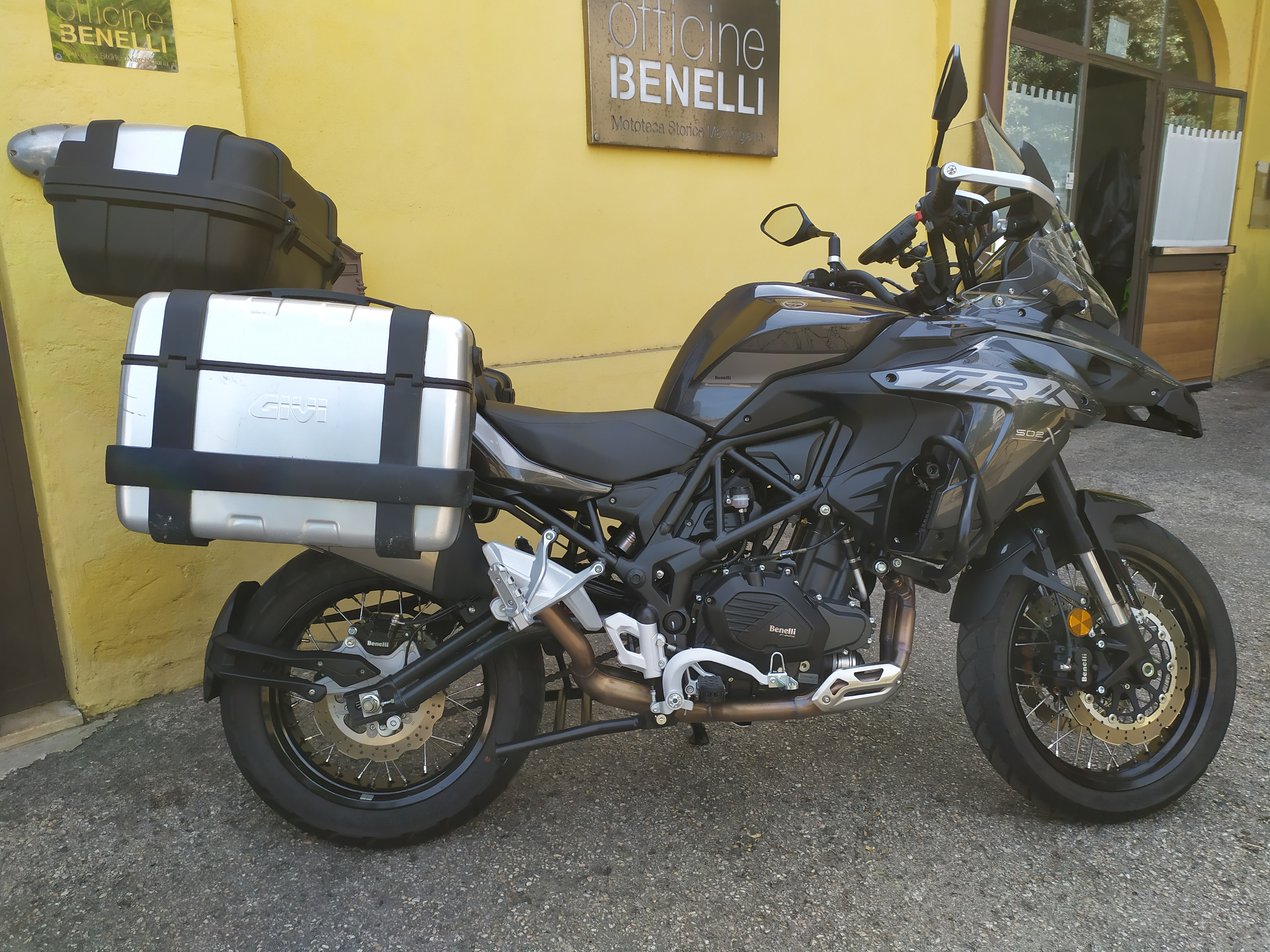 Benelli TRK 502 versione 2020